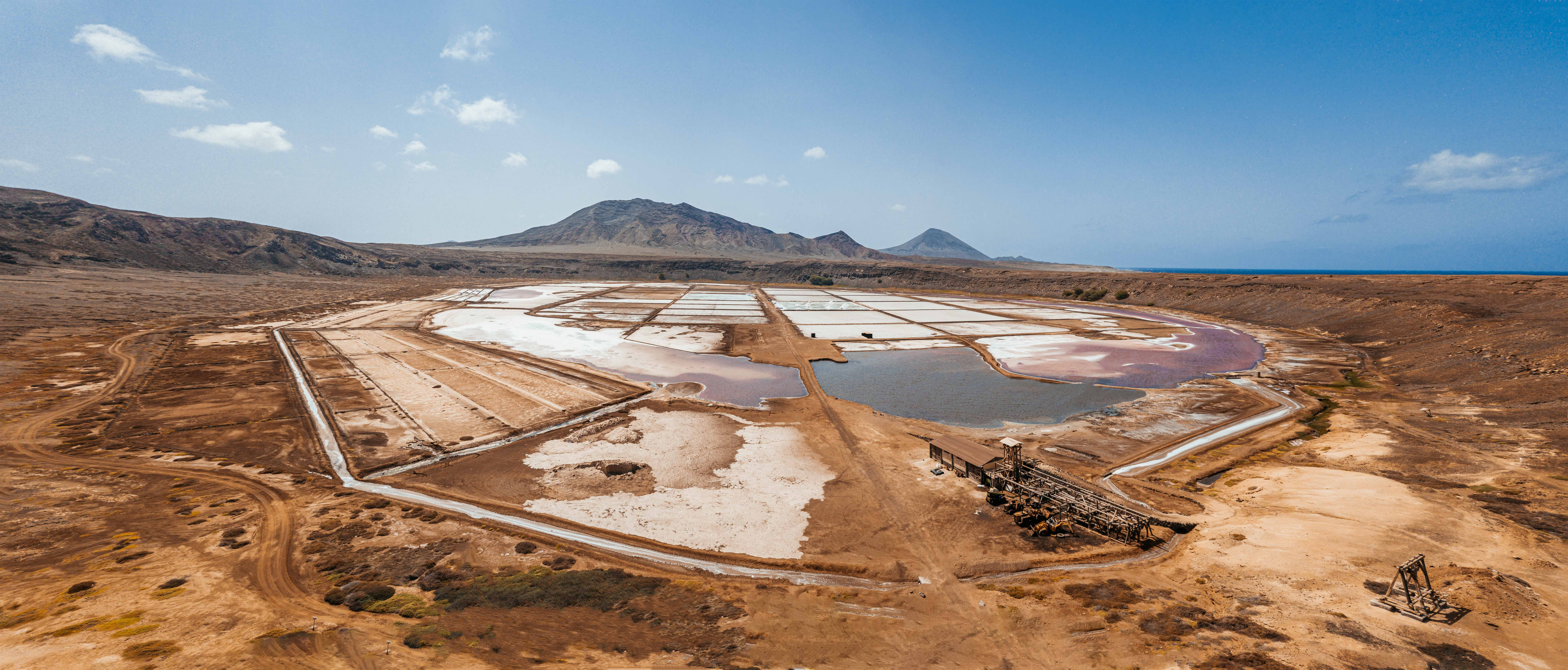 Saline "Pedra de Lume" Juni 2019